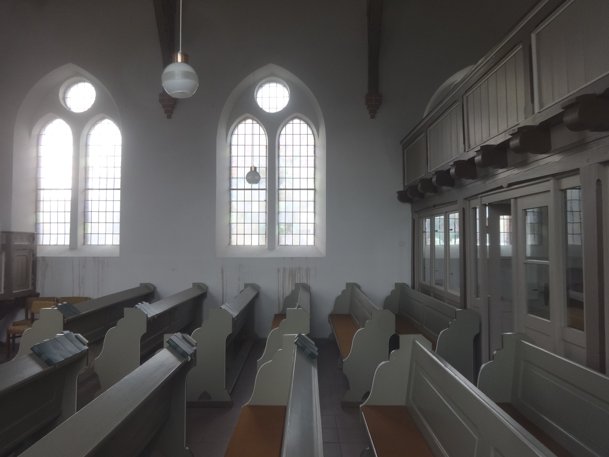 Die Dorfkirche in Ruhlsdorf ist ein neugotischer Backsteinbau aus dem Jahr 1904. Im Innern befindet sich eine bauzeitliche Ausstattung.